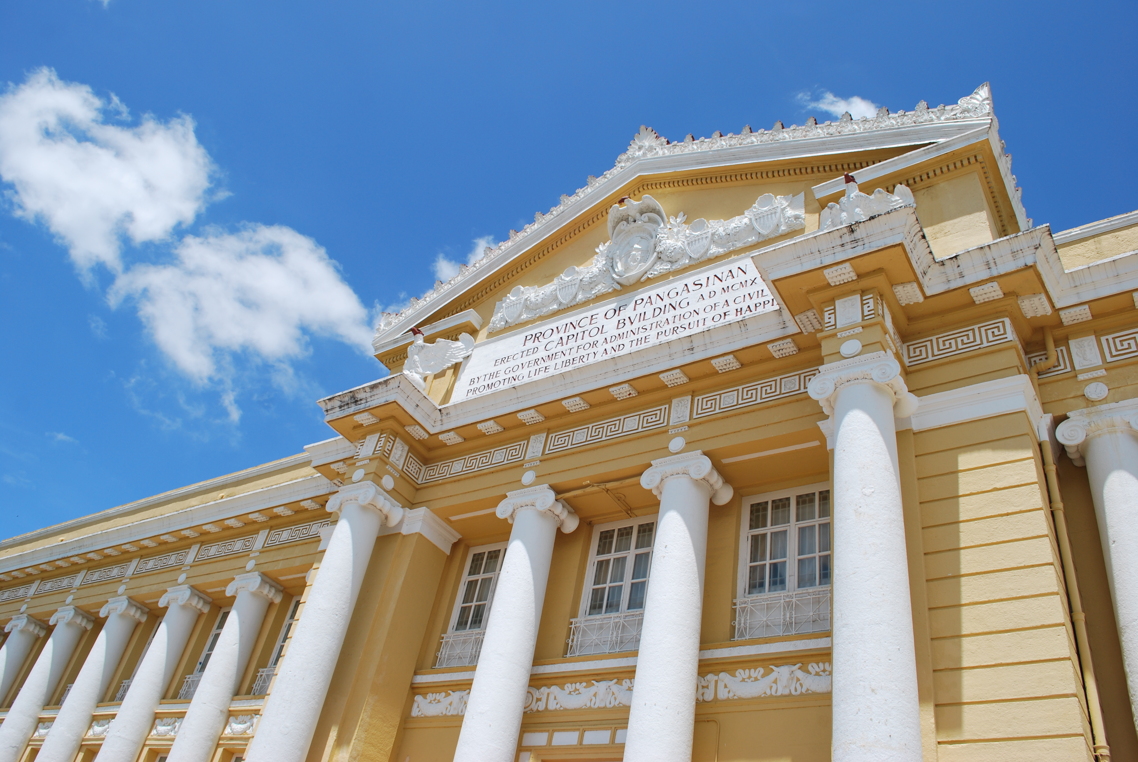 Pangasinan provincial capitol in Lingayen, Philippines